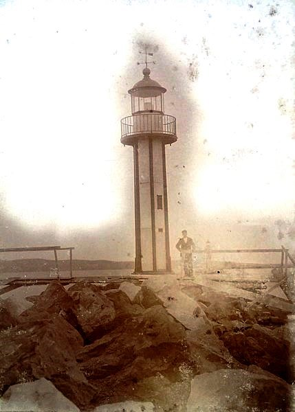 Снимки на членове на техническия състав на БАД за направа на Варненското пристанище, на работници, обекти, машини и съоръжения по време на строителните работи.